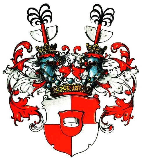 Wappen der Freiherren von Kottwitz (Variante).